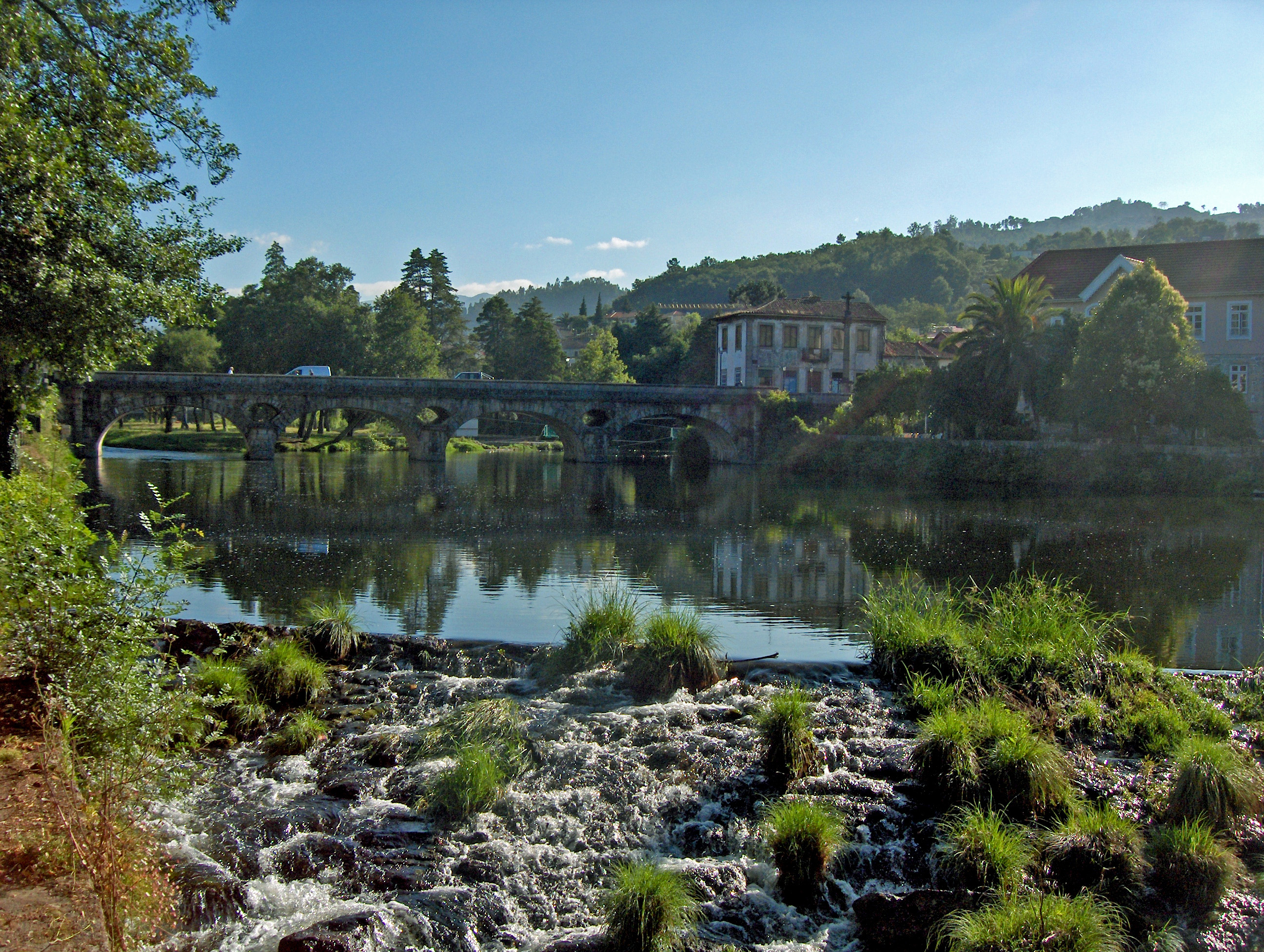 Rio Vez em Arcos de Valdevez, Portugal.